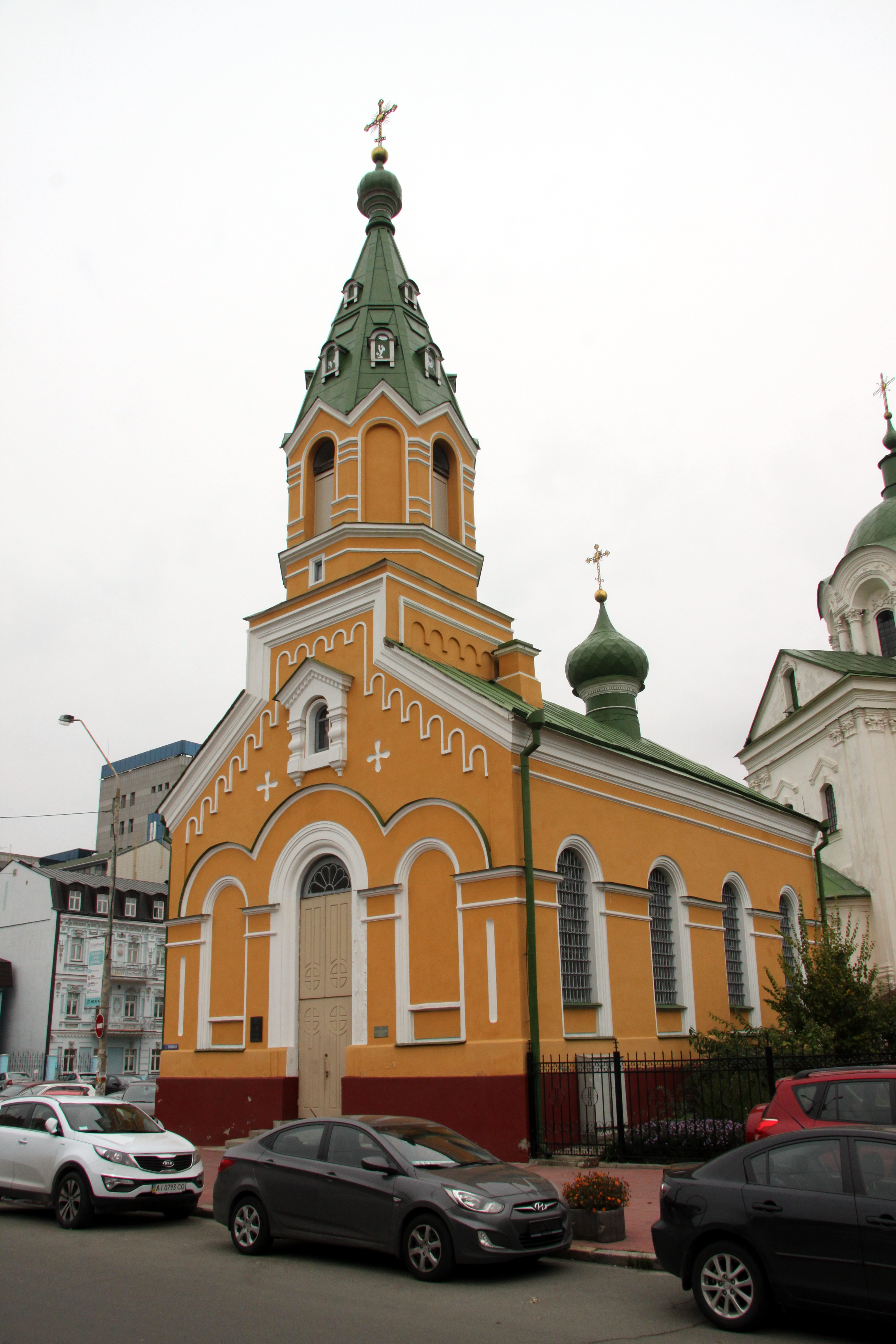 Дзвіниця церкви Миколи Набережного, Київ, Сковороди Григорія вул., 12/4